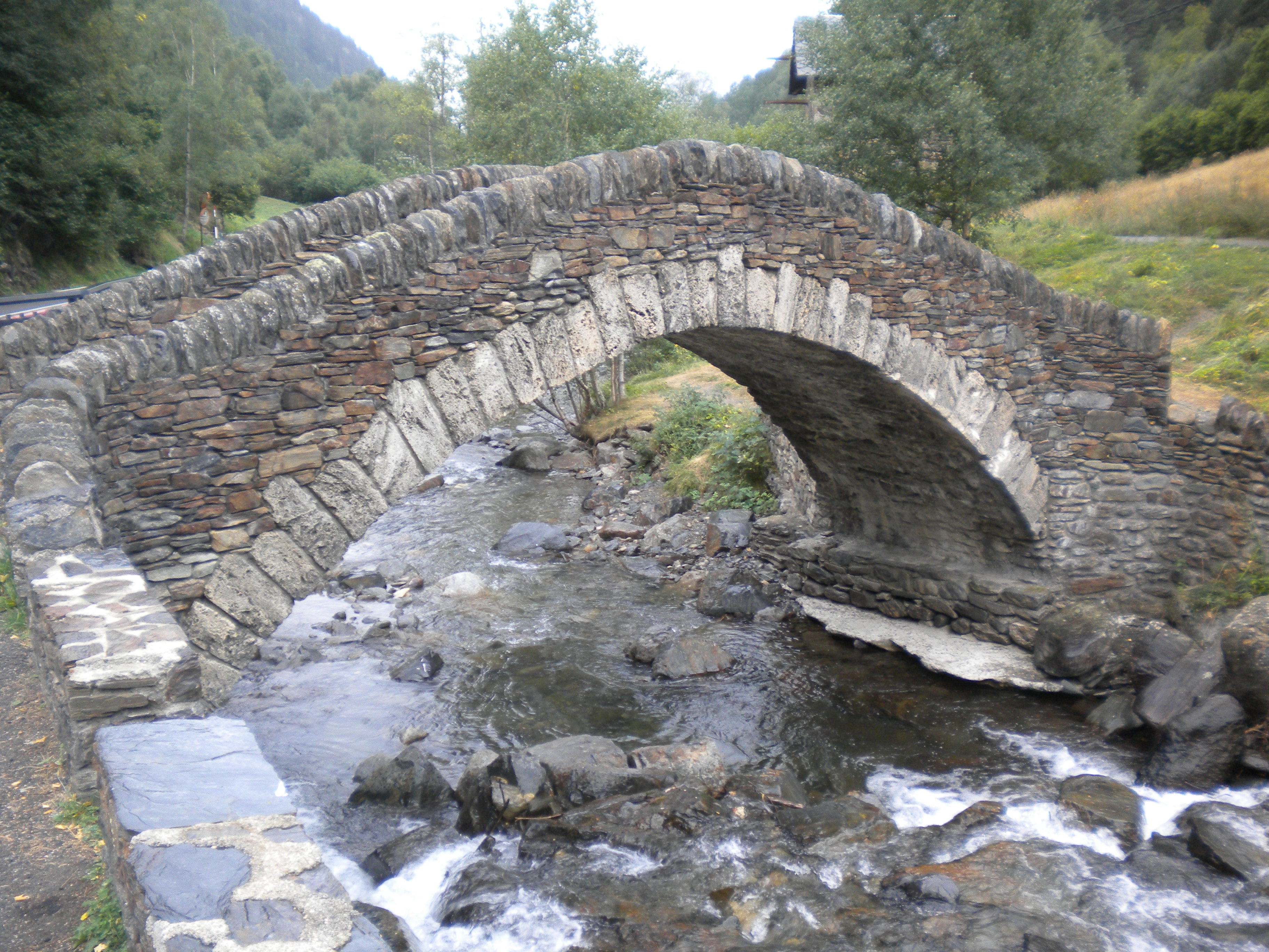 Pont d'Ordino, o de Sant Antoni de la Grella, a la Massana, Andorra.